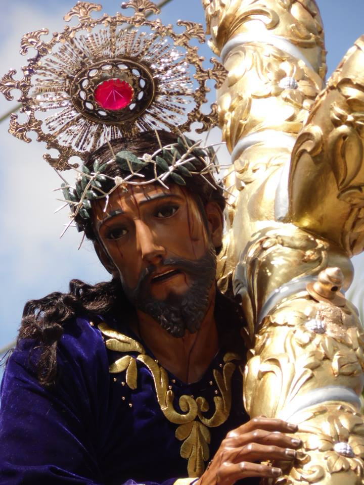 Venerada Imagen que se encuentra en la Parroquia Nuestra Señora de la Asunción del municipio de Jocotenango departamento de Sacatepéquez y que sale en procesión cada Tercer Domingo de Cuaresma en Jocotenango y La Antigua Guatemala. Guatemala C.A.